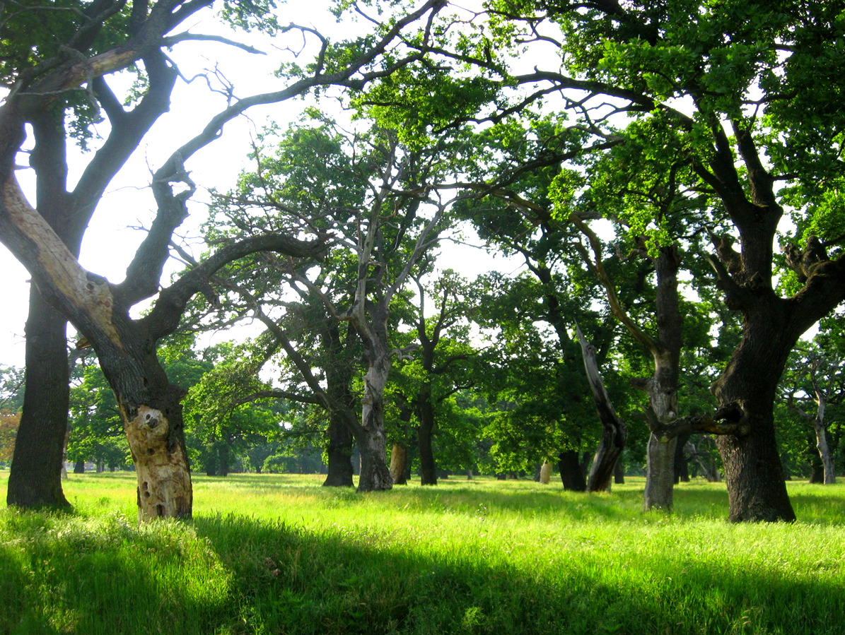 Српски (ћирилица): Шалиначки луг је шумско подручје у Србији. Налази се 10 km источно од Смедерева, у пространој равници Годоминског поља, насталој наплавинама Велике Мораве, у подручју њеног ушћа у Дунав. Непосредно га окружују насеља Шалинац и Кулич, а у широком луку и некадашња окука (меандар) Велике Мораве, која је данас мртваја. Представља високу, скоро једно-добну, чисту састојину, коју чини више од 200 столетних храстова лужњака (лат. Quercus robur L.), некада у заједници са пољским јасеном (лат. Fraxinus angustifolius). Заштићено подручје обухвата површину од 19 хектара. Старост ове састојине се процењује у распону од 200 до 300 година. Просечне димензије храстова су: висина стабла 17,58 m; пречник крошње 15,43 m; обим дебла 4,14 m и пречник дебла 1,32 m. Ово је фотографија заштићеног природног добра у Србији под шифром: СП309 This is a a photo of a natural area in Serbia with ID: СП309